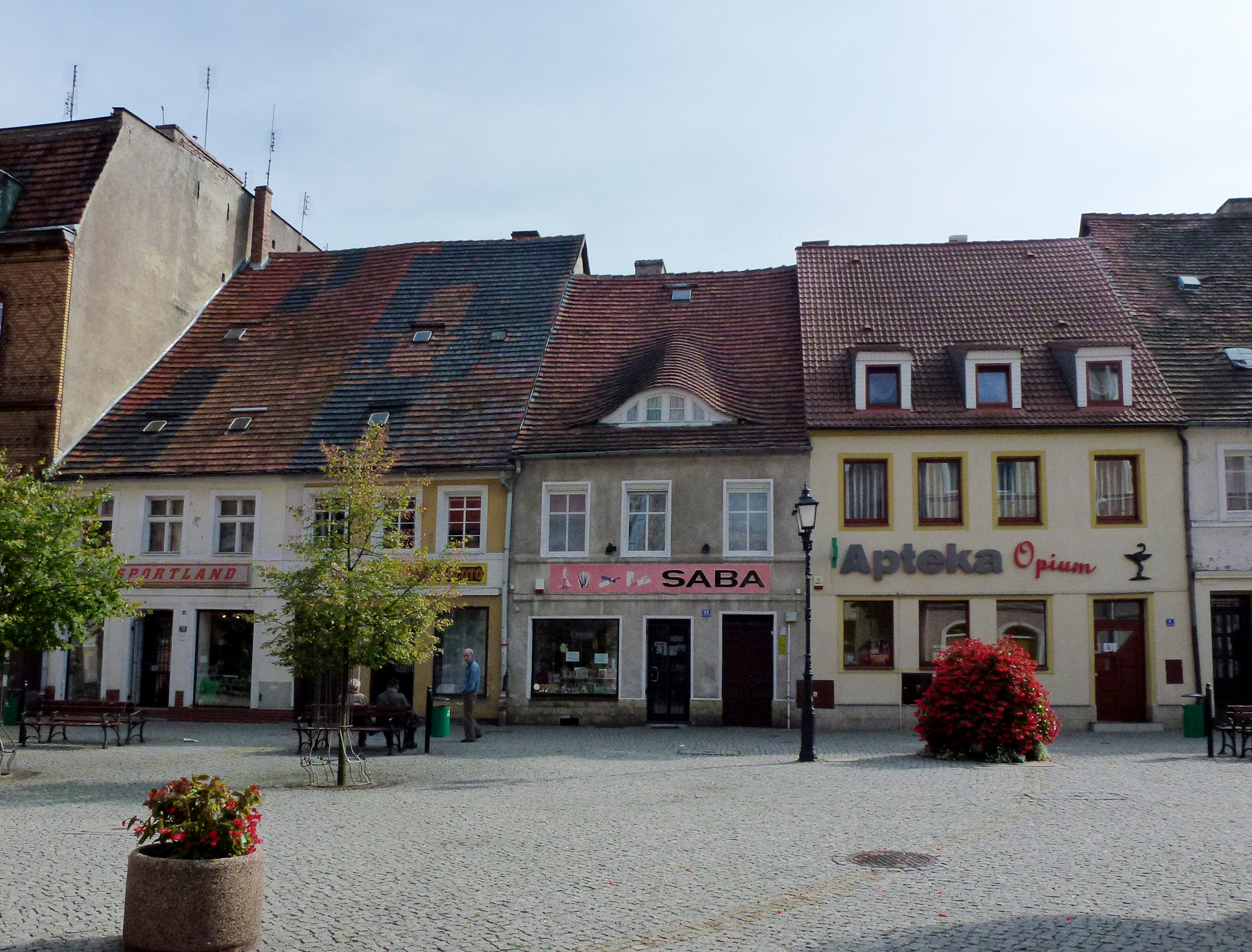 zabudowa, XIX Lubsko, pl. Wolności, nr: 3/4,7,8,9,11,12,14,15,19,20,23,25,30,31,32,33, Lubsko 05.1974.